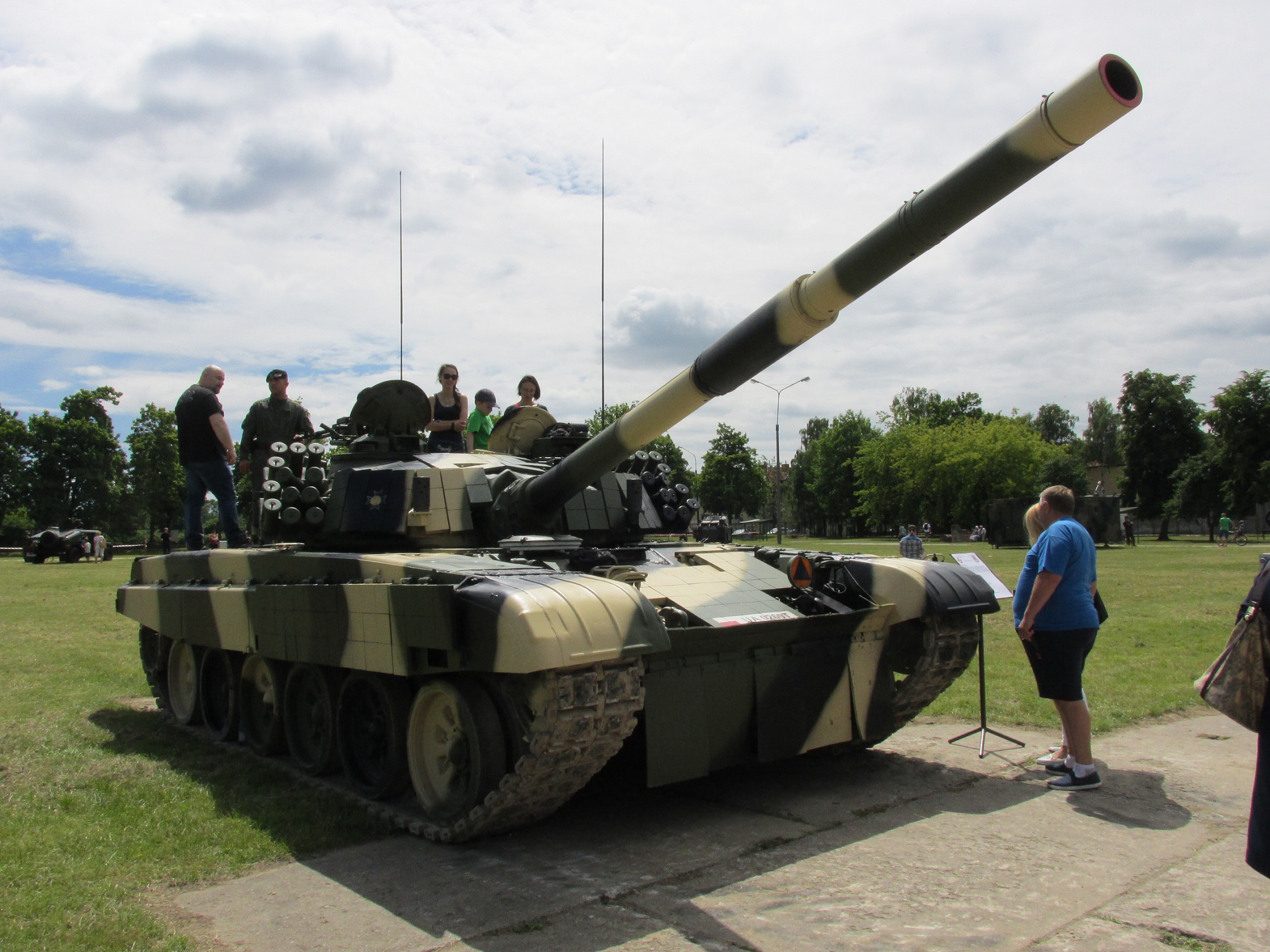 Tank PT-91 "Twardy" from 9 Braniewska Brygada Kawalerii Pancernej